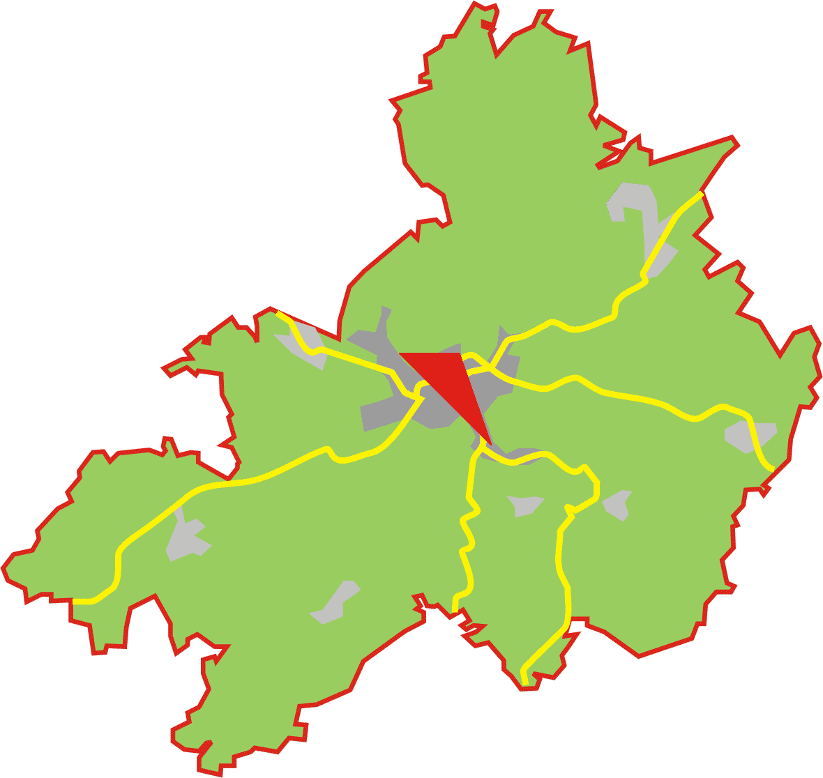 Karte von Benutzer:JensD. Pfeil platziert von Benutzer:Trexer.